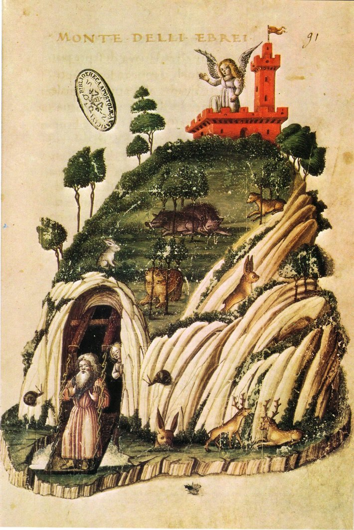 Illustrazione di allegorie dell'alchimia attinente al "Monte degli Ebrei", da Aurora Consurgens, Roma, Biblioteca Vaticana, ms Codex Urbinatensis Latinus n. 899,[1] folio 91 retro.[2]